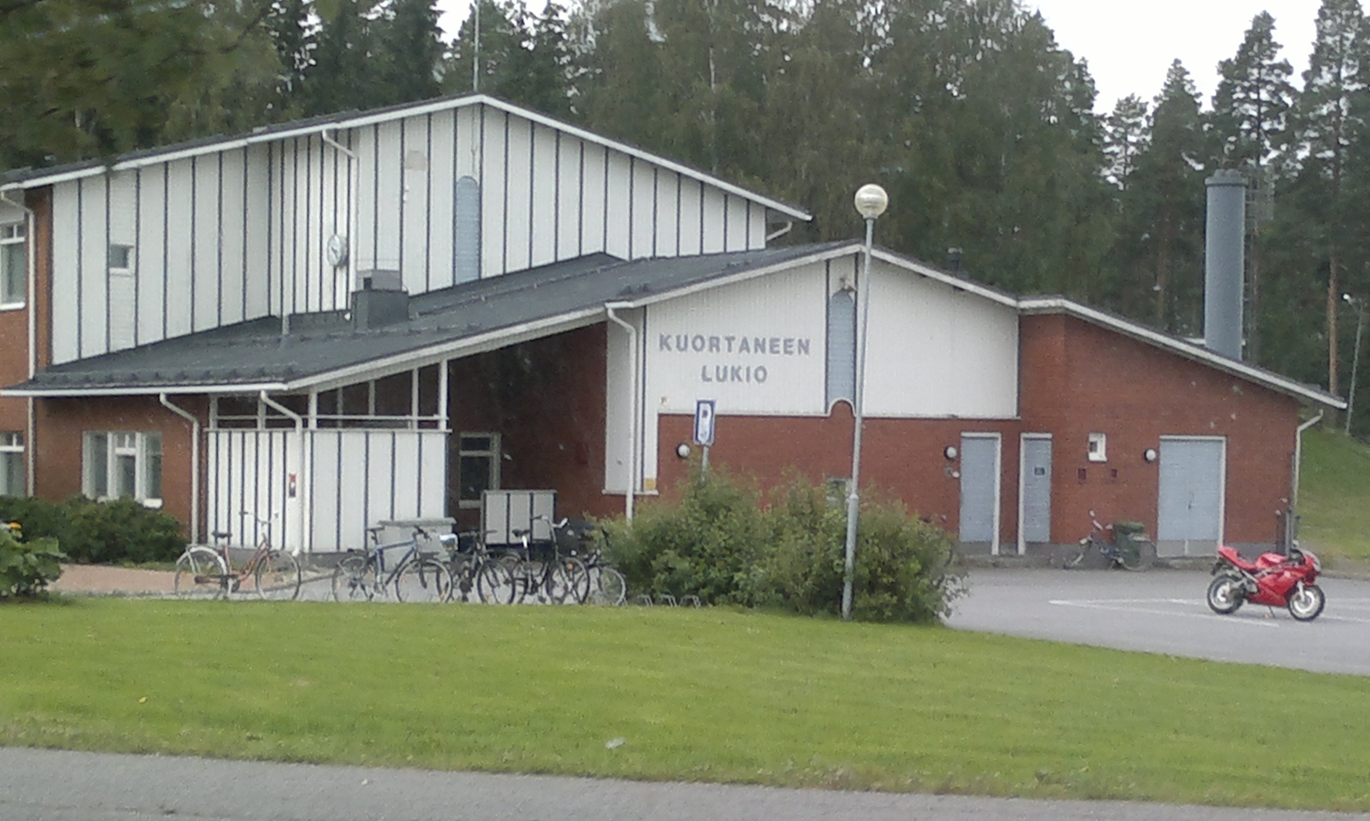 Kuortaneen lukio